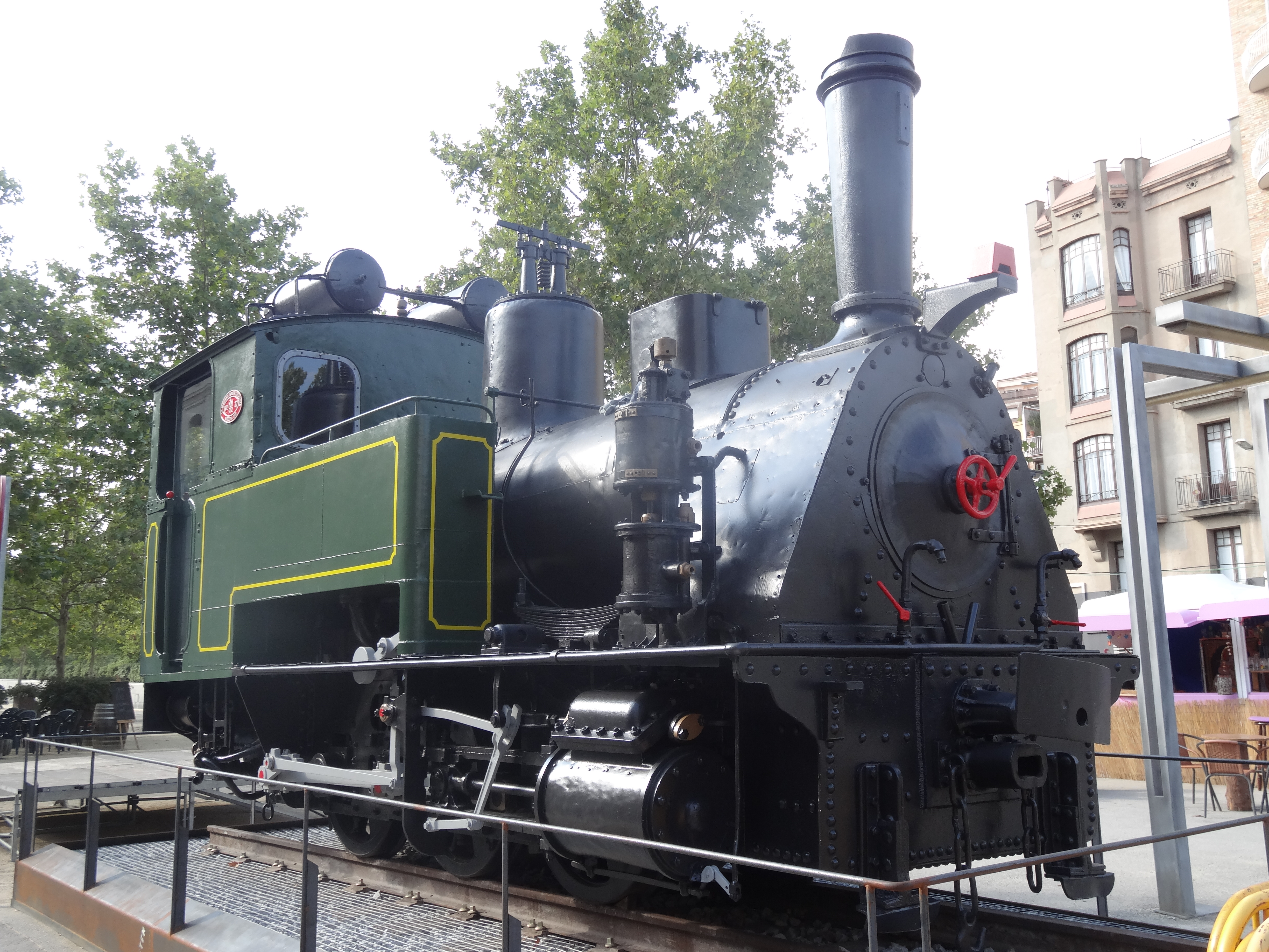 Màquina de tren al Parc de l’Estació Vella, a Igualada. Màquina del model Berga fabricada per l'empresa alemanya Krauss Locomotive Fabrik-Krauss & Co. l'any 1896. Va ser la número 7 part d’un lot de vuit màquines adquirit per l’antiga companyia gestora de la línia Manresa-Berga i va ser batejada com a Balsareny. Posteriorment, quan l’empresa s’integra a la Companyia General de Ferrocarrils Catalans passa a lluir el número 27. Als anys 1960 és retirada del servei i l’any 1973 és instal·lada com a monument històric a l’Estació Nova d'Igualada. Finalment, el 1989, és traslladada al Parc de l’Estació Vella, on l'any 2014 fou restaurada.